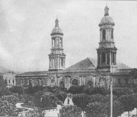 Imagen de la antigua catedral de Concepción, Chile, antes del Terremoto de Chillan de 1939.